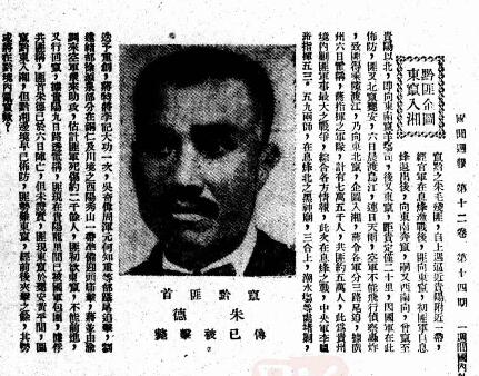 题名： 一周间国内外大事述要(由二十四年四月五日起至二十四年四月十一日止):国内:剿匪军事又一变化:入黔剿匪之中央军军长:李韫珩,周浑元,刘建绪:[照片三幅] 文献来源： 《国闻周报》 出版时间： 1935 年 卷期(页)： [ 第12卷 第14期 ，50页 ]